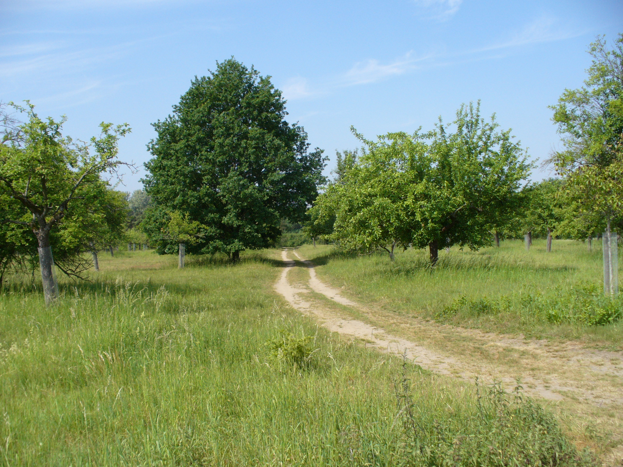 Der größte Teil des Gailenbergs besteht aus Streuobstwiesen und Magerrasenflächen